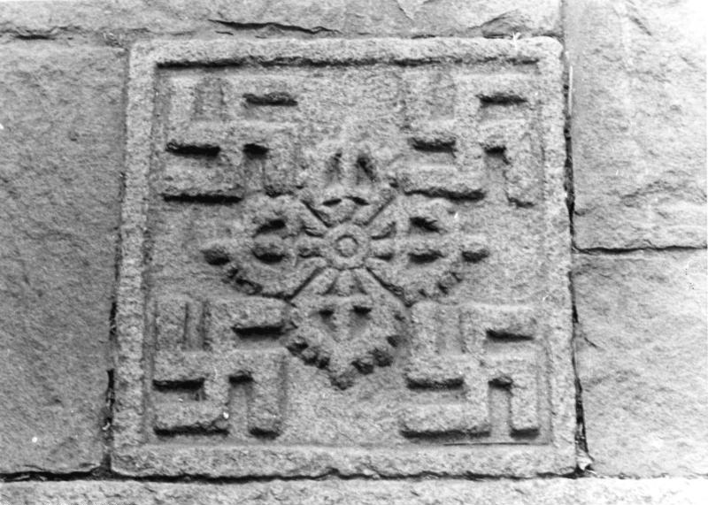 Lhasa, Hakenkreuz-Bildhauerei